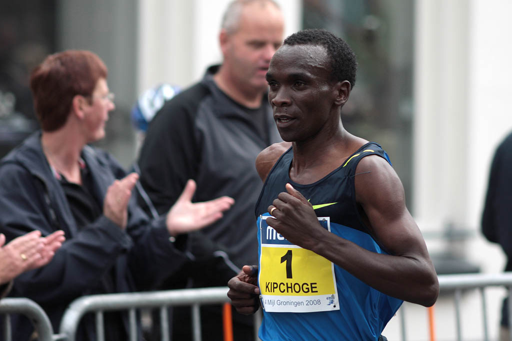 Keniaans hardloper Eliud Kipchoge tijdens de 4 Mijl van Groningen.